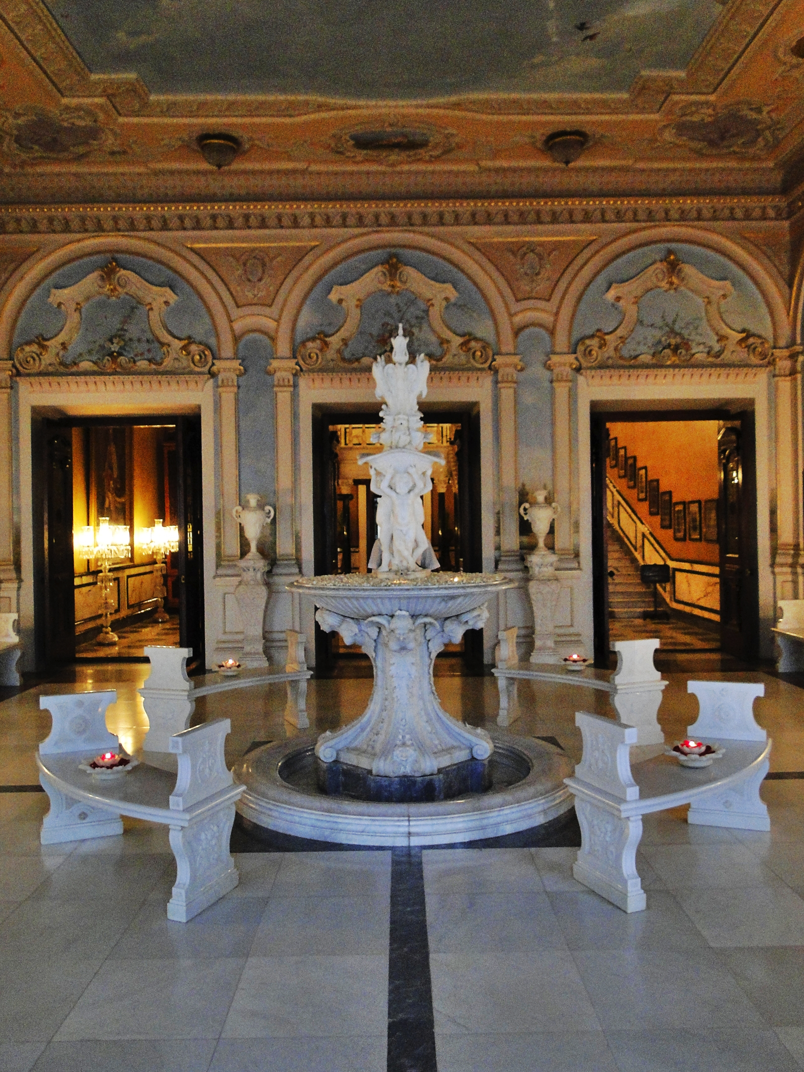 Interior of Falaknuma palace, Hyderabad, India